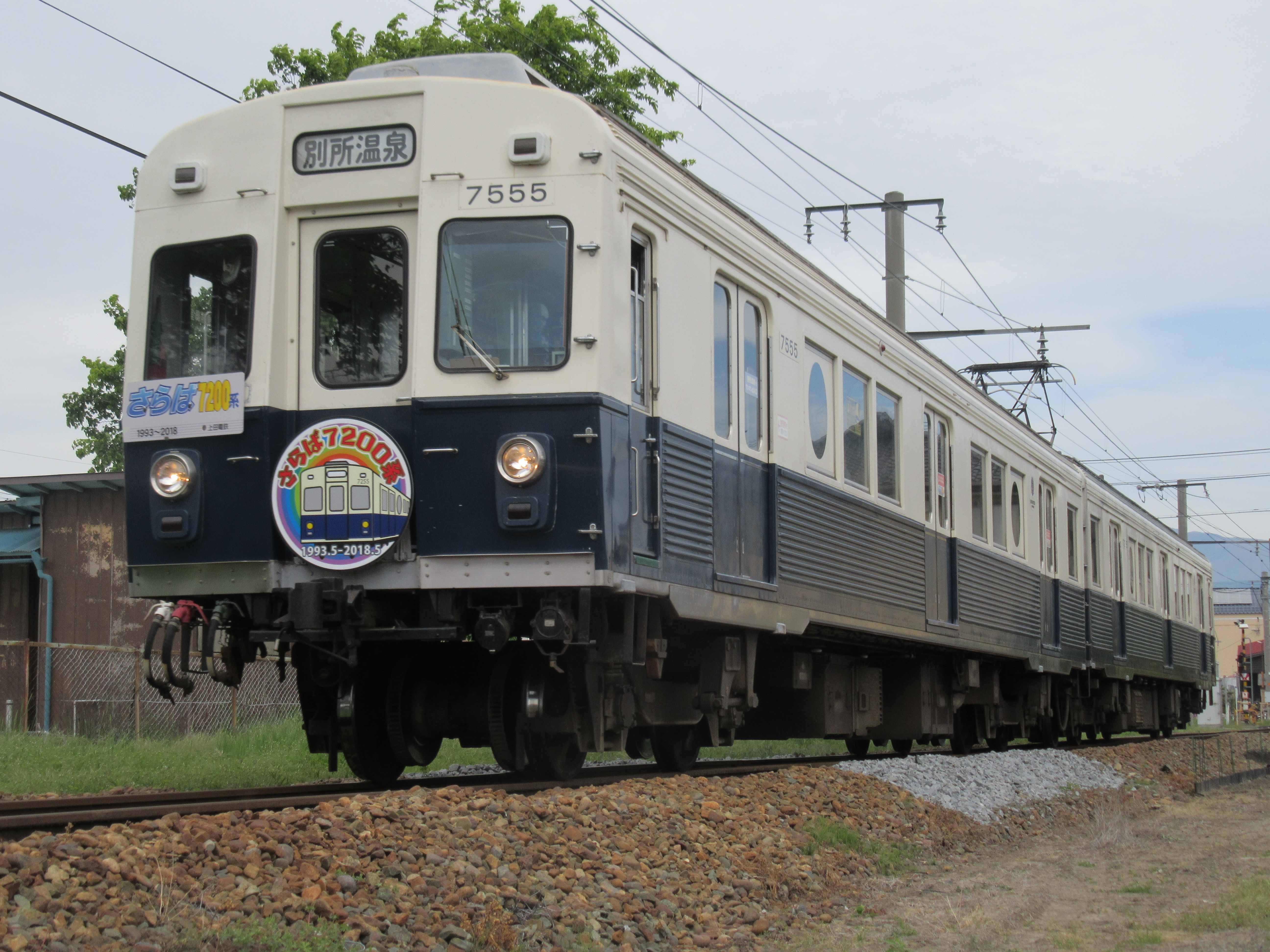 2018年5月12日 三好町～赤坂上間にて